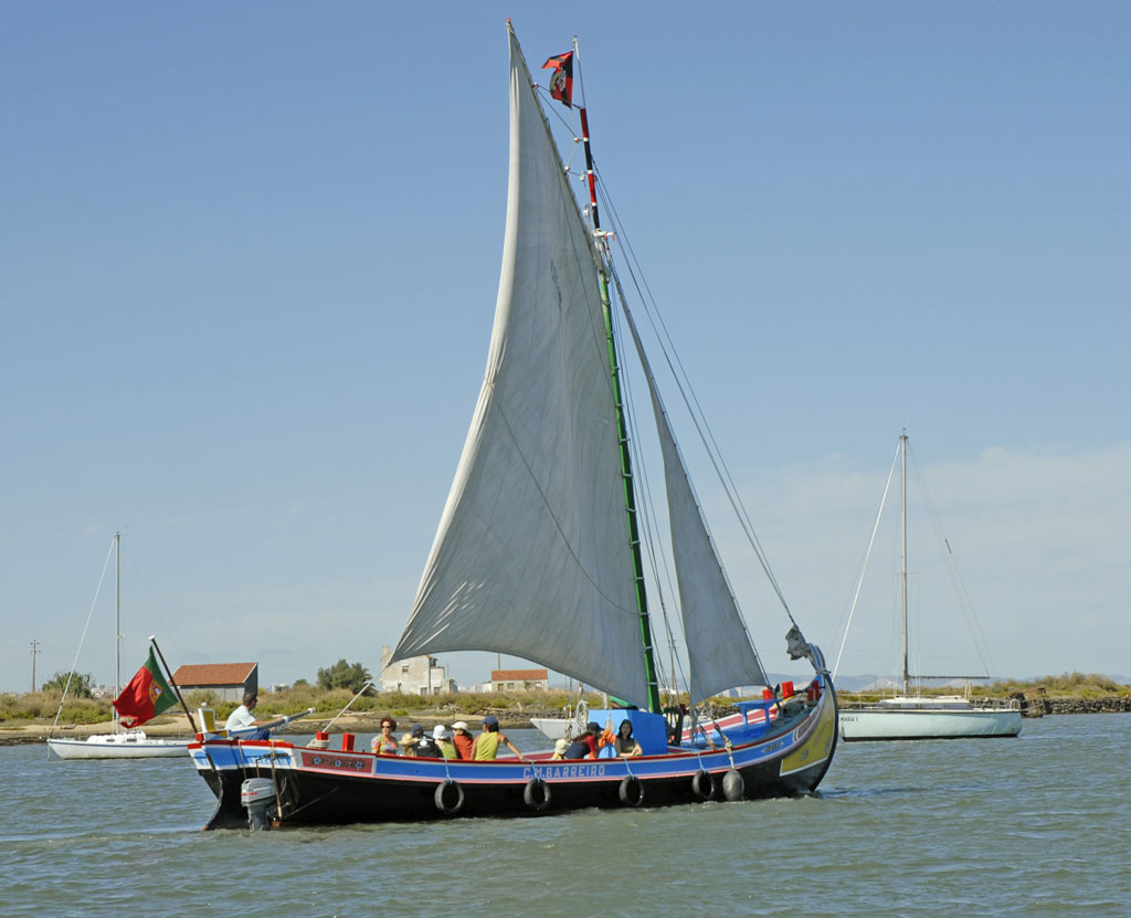 Seixal est une ville de 31.000 habitants située dans le district de Setubal, sur les bords du Tage, à 20 Km de Lisbonne. L'écomusée de Seixal étudie et valorise le patrimoine maritime et industriel de la région à travers l'aménagement de sites et d'espaces d'interprétation. Son siège se trouve dans les locaux de l'ancienne usine de liège Mundet.